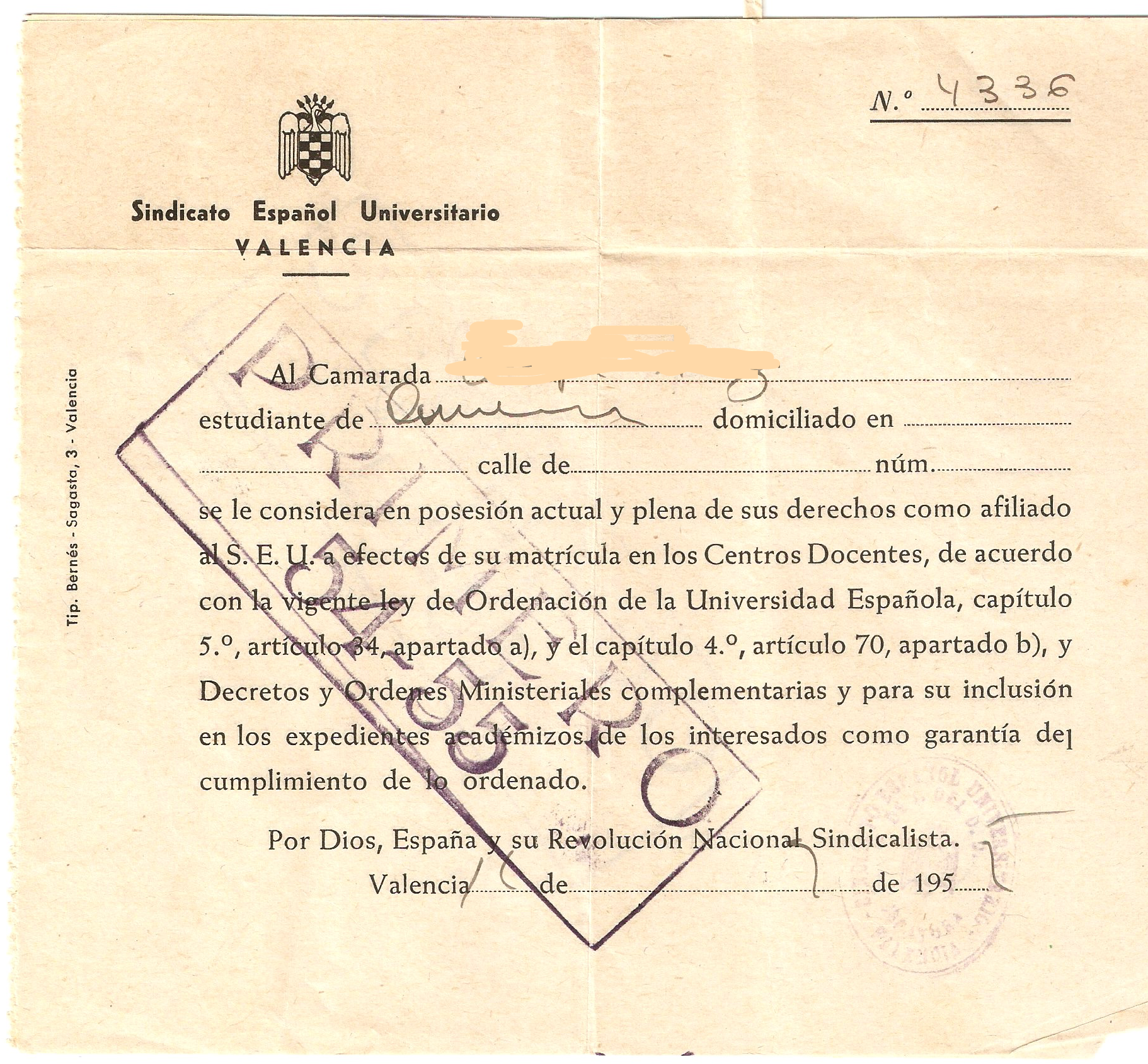 Certificado de afiliación al Sindicato Español Universitario. La pertenencia al SEU era obligatoria para realizar estudios universitarios.